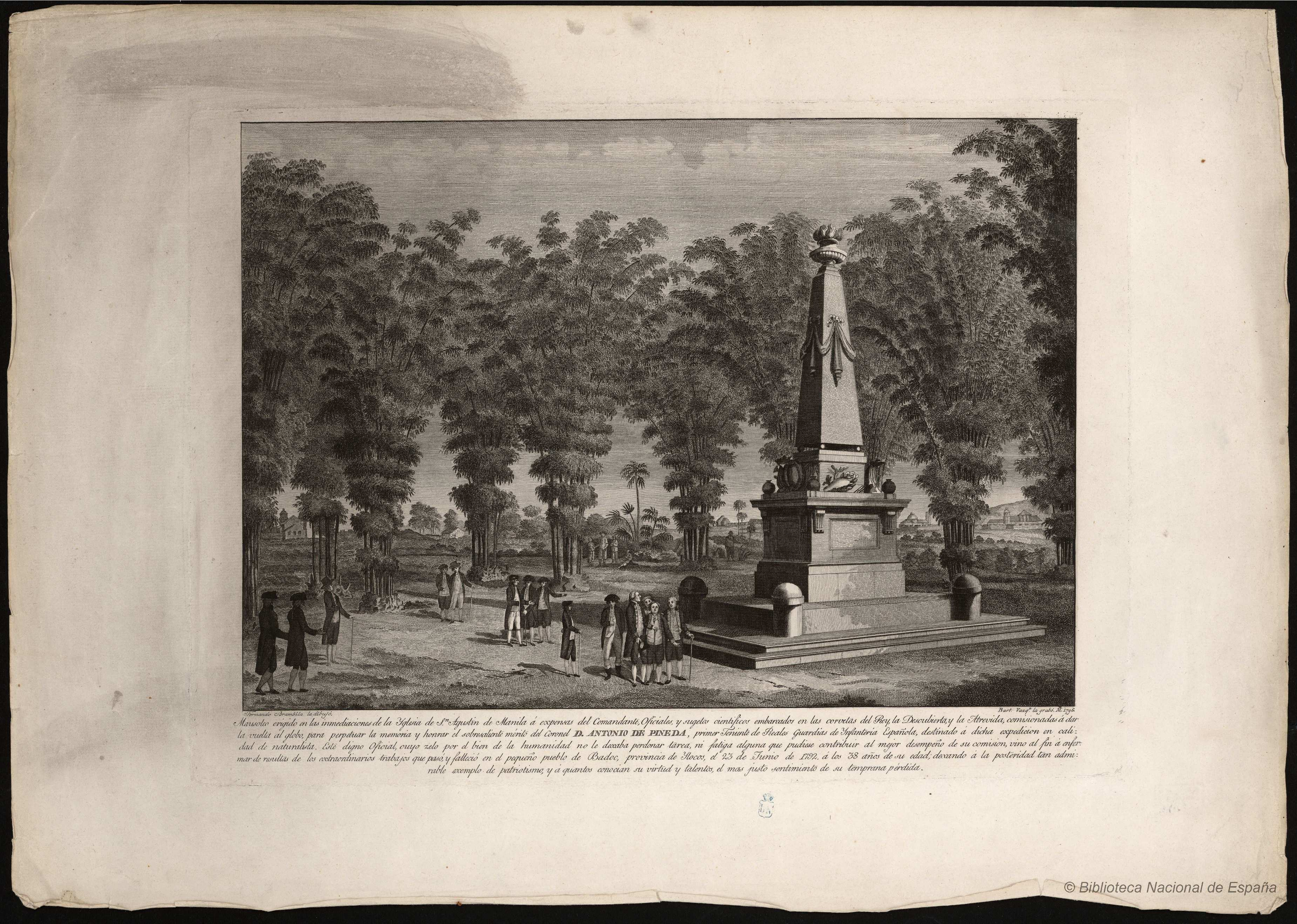 Mausoleo del coronel don Antonio de Pineda, grabado calcográfico, Madrid, Biblioteca Nacional de España